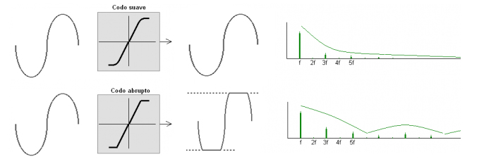 Descripció gràfica de l'efecte del hard-clipping en les ones